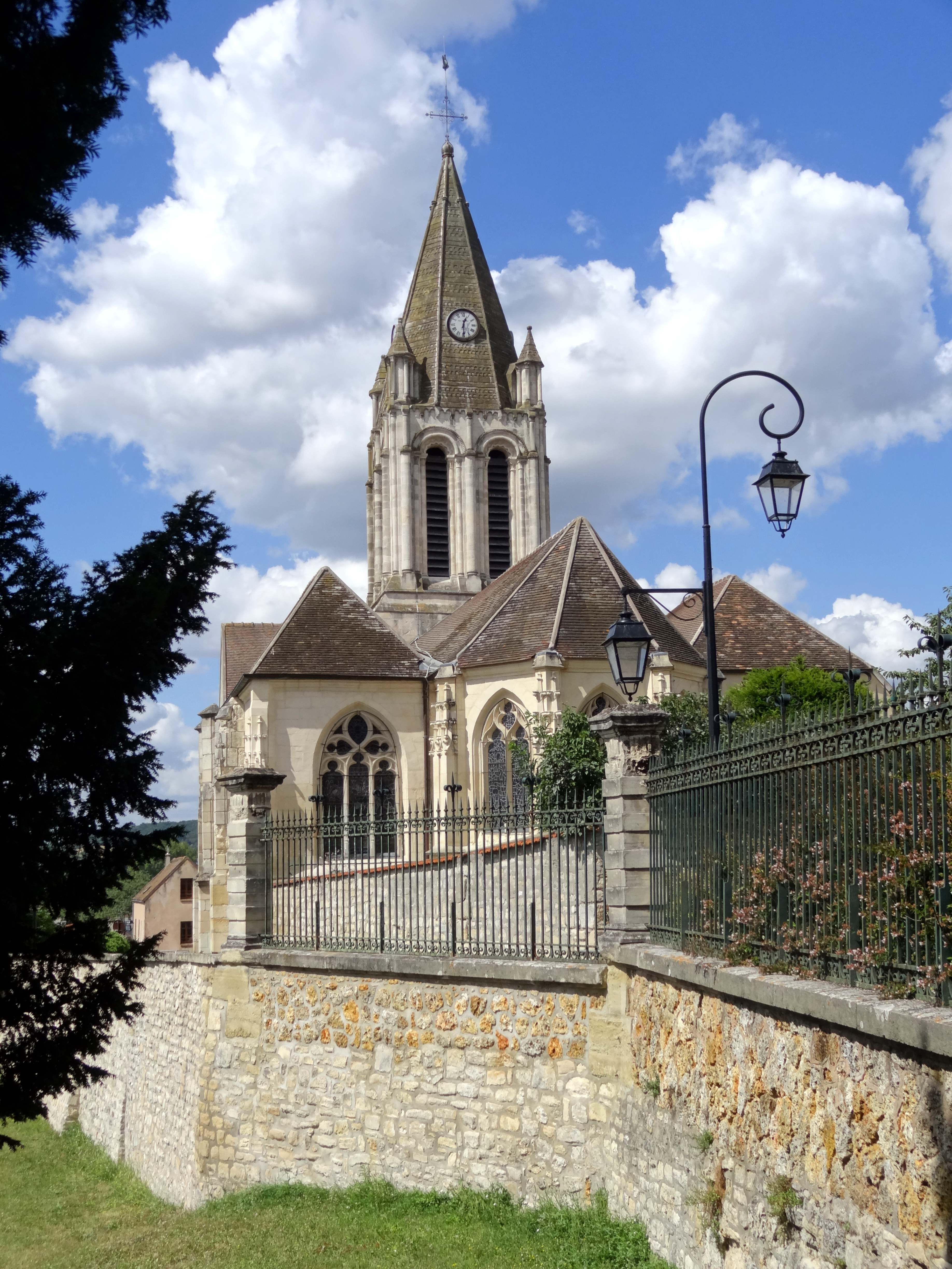 Église Saint-Maclou de Conflans-Sainte-Honorine - voir titre.